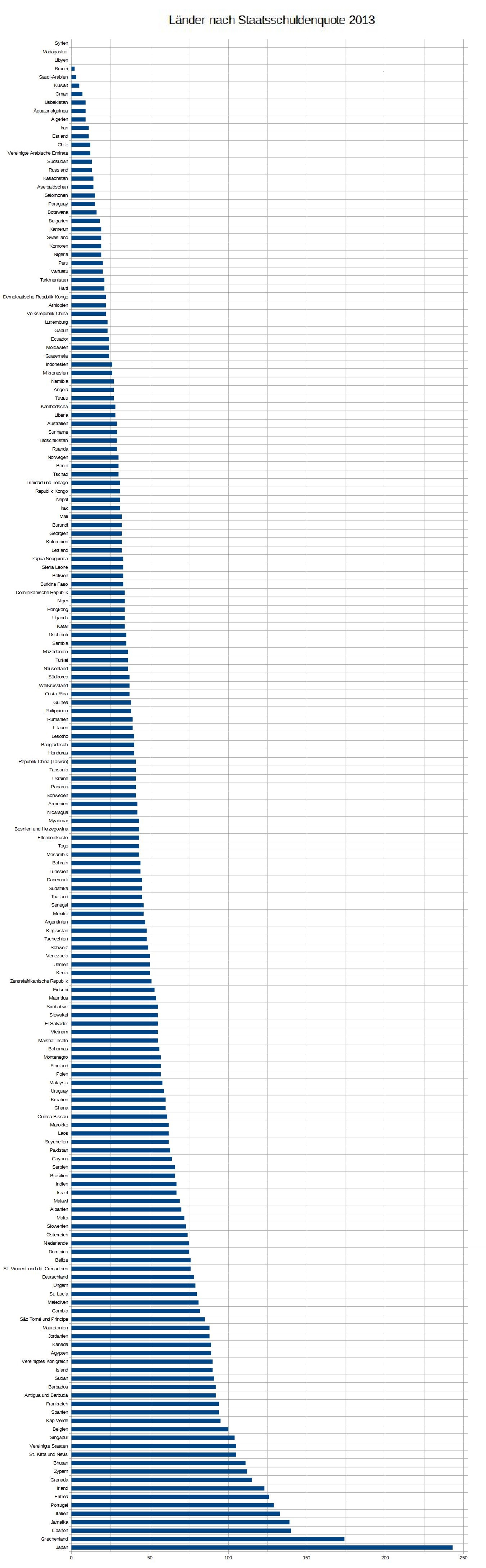 Staatsschuldenquote 2013